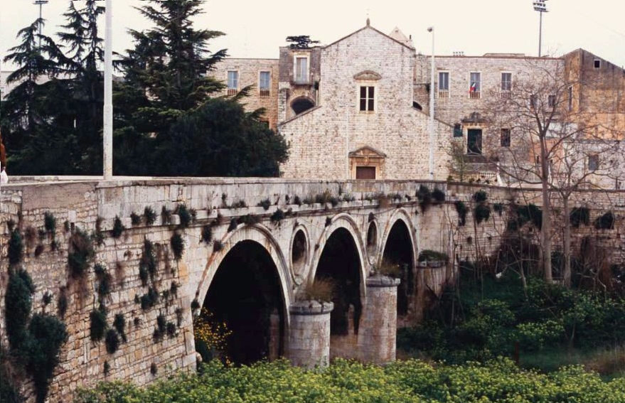 Ponte del tiflis e Chiesa di Santa Teresa (santa Maria del Popolo) a Bitonto (provincia di Bari).